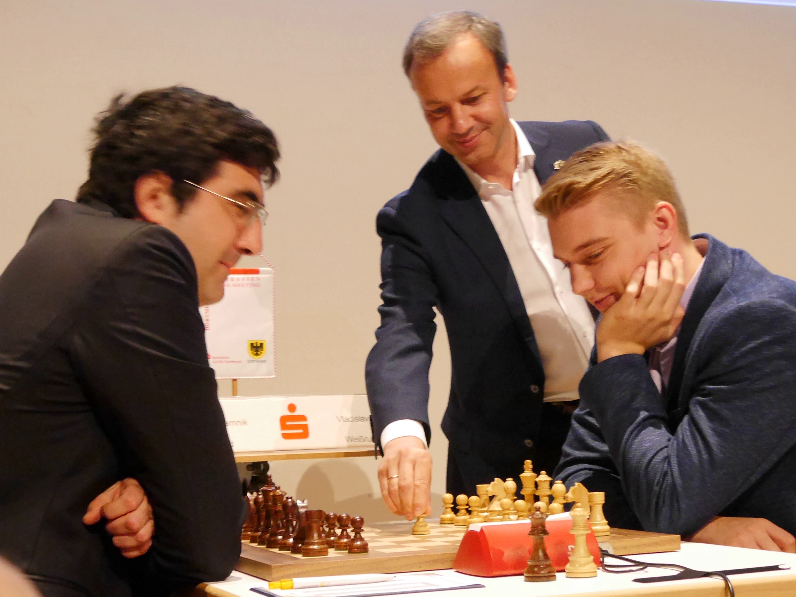 Arkady Dvorkovich führt den 1. Zug für Vladislav Kovalev, Gegner von Wladimir Kramnik, 2018 in Dortmund aus.